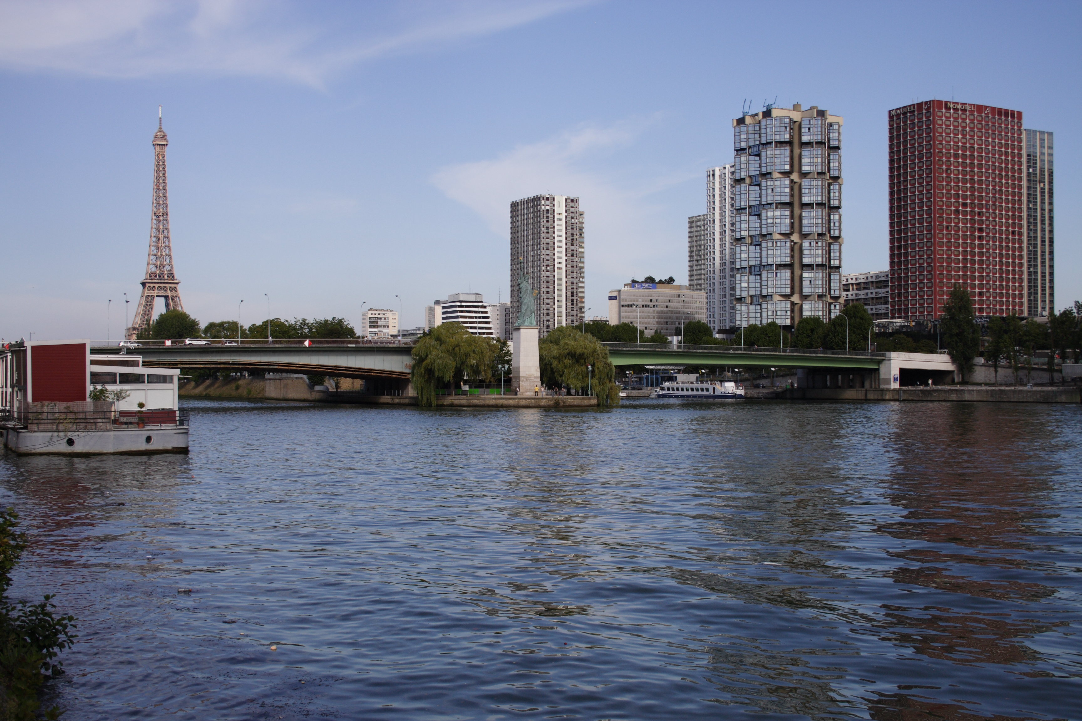 Pont de Grenelle(Paris, France)